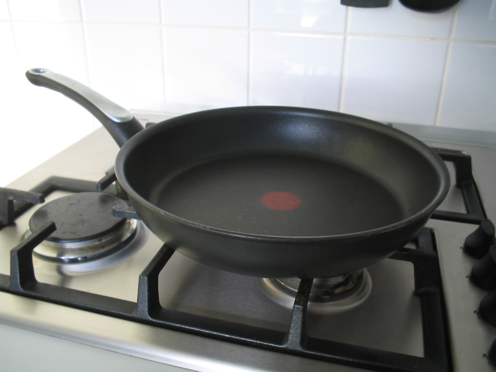 Beschrijving: een koekenpan Auteur: M.Minderhoud Licentie: eigen werk, gfdl